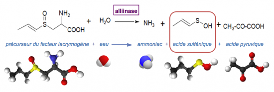 1ère réaction